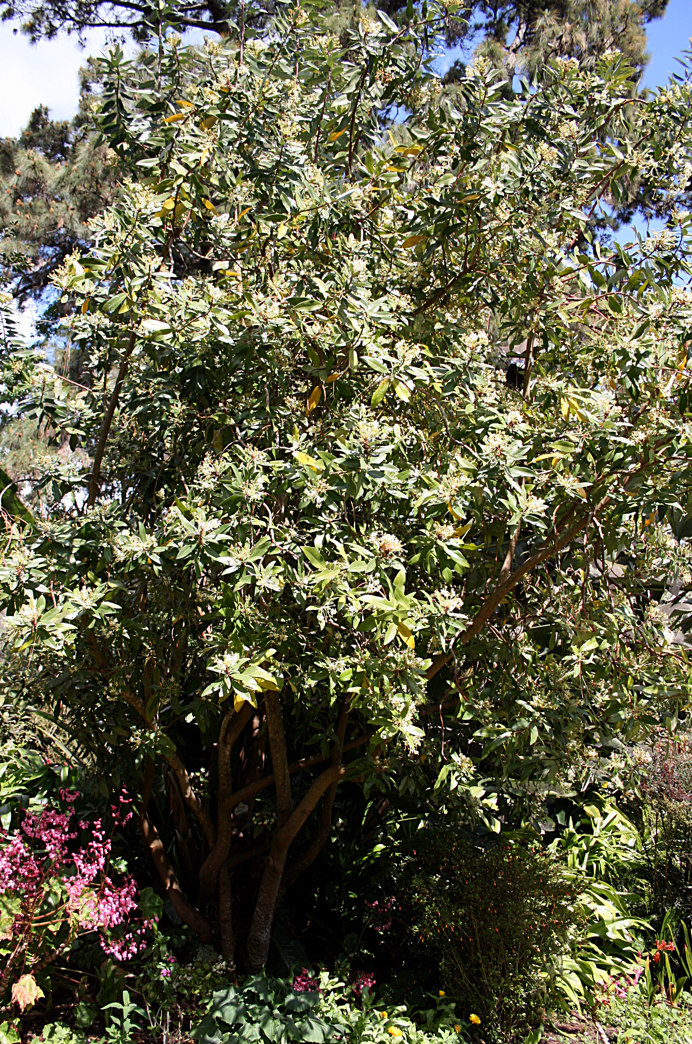 Madeira,_Palheiro_Gardens_-_Drimys winteri_(Canelo, Südamerika)